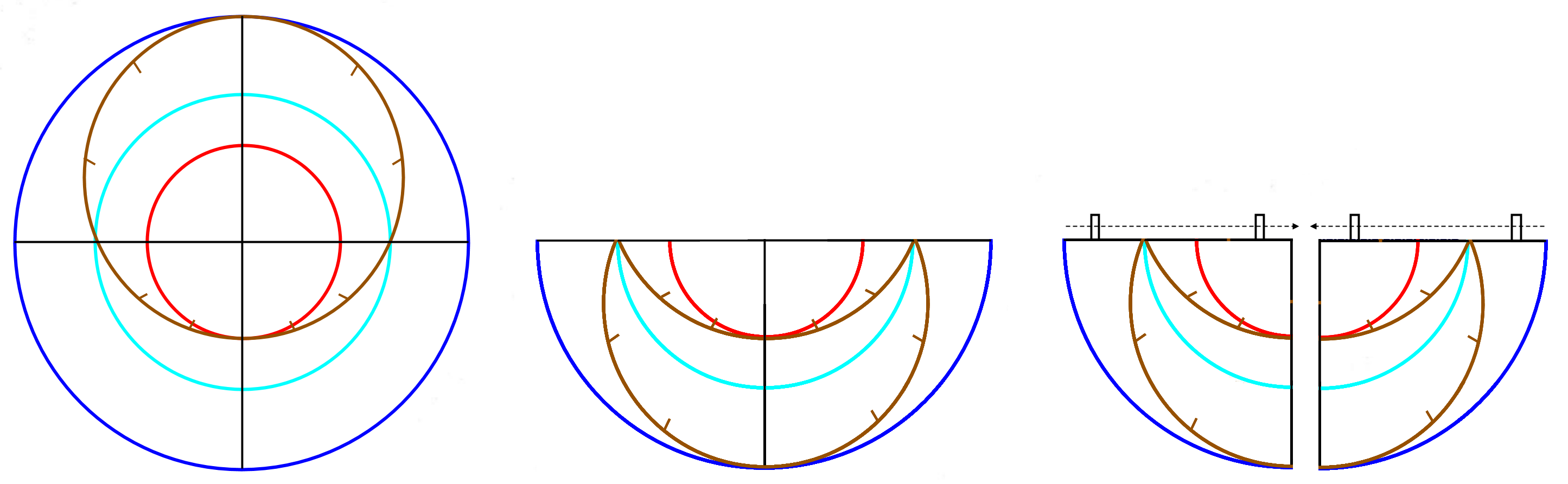 Construction d'un quadrant vetustior à partir de la projection stéréographique d'un astrolabe planisphérique.